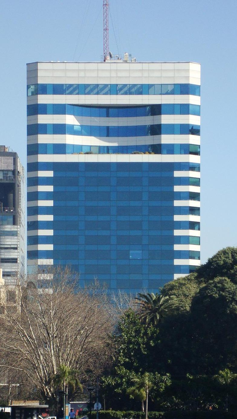 Torre Fortabat. Ubicación: Bouchard 680 Arquitecto: Peralta Ramos SEPRA Año: 1991-1993 Buenos Aires, Argentina